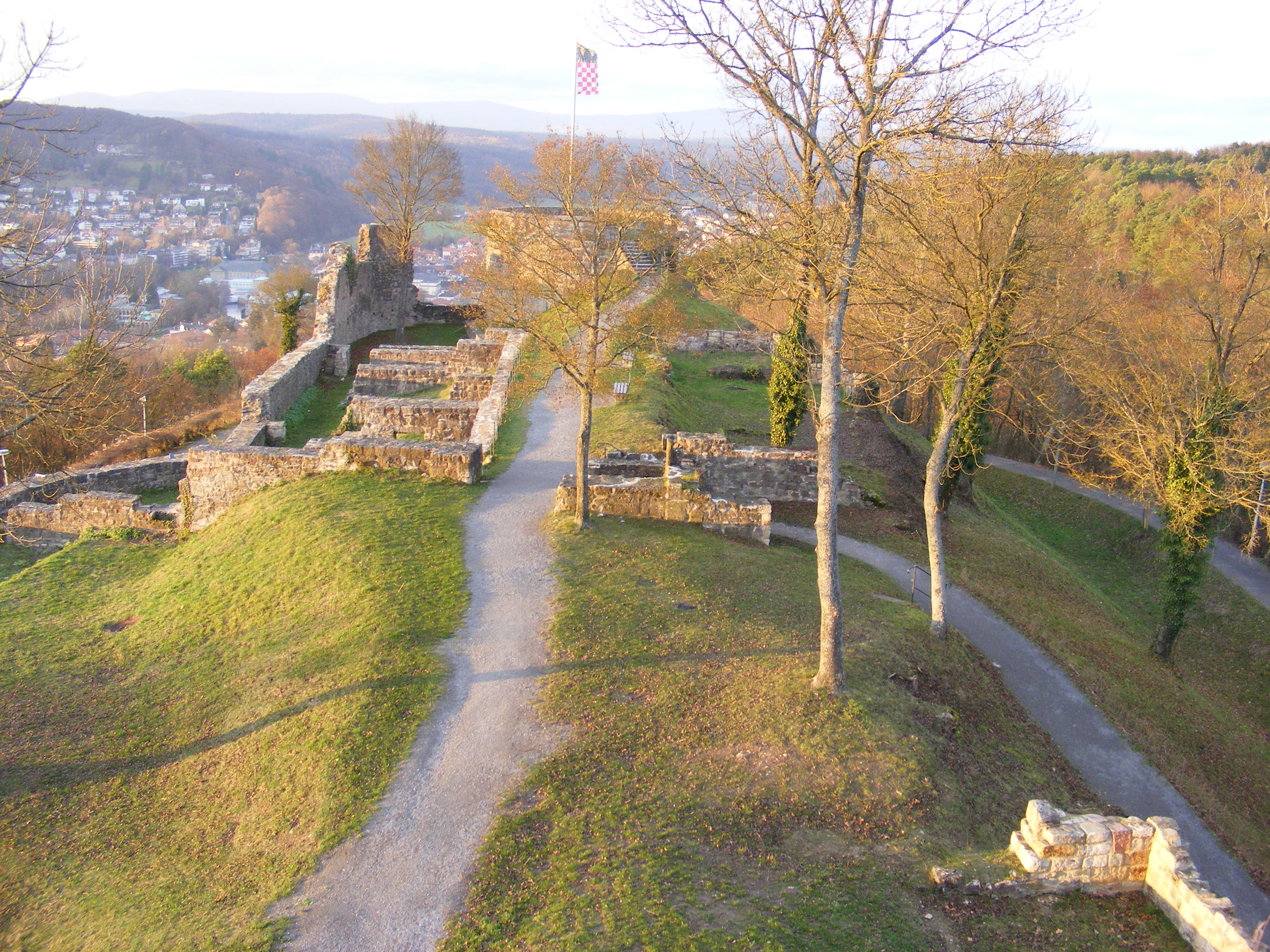 Burgruine Botenlauben vom hinteren Turm gesehen (im Hintergrund: Bad Kissingen).